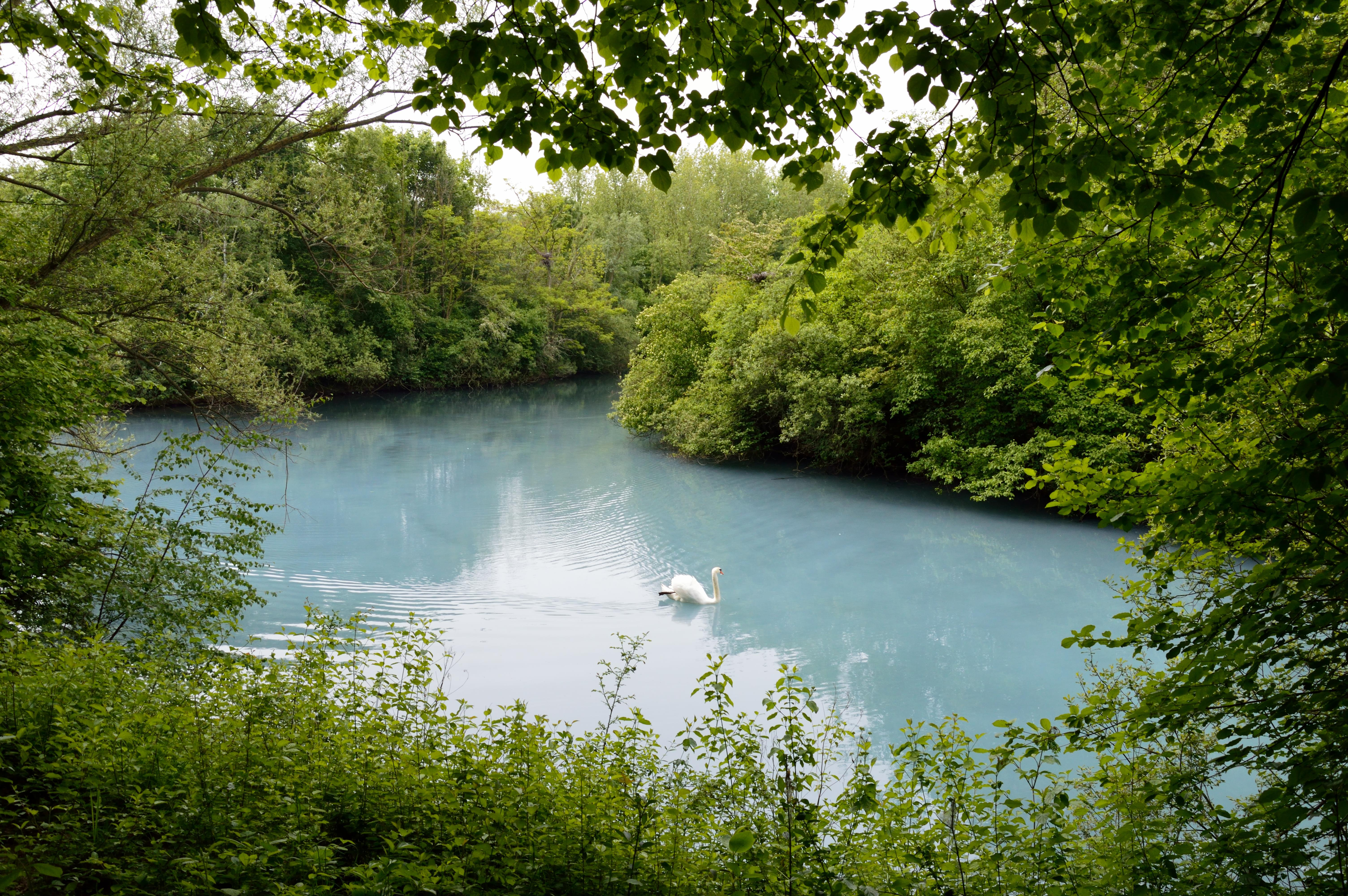 Milchige Trübung der Harpener Teiche durch das eingeleitete warme mineralreiche Grubenwasser der Zeche Robert Müser